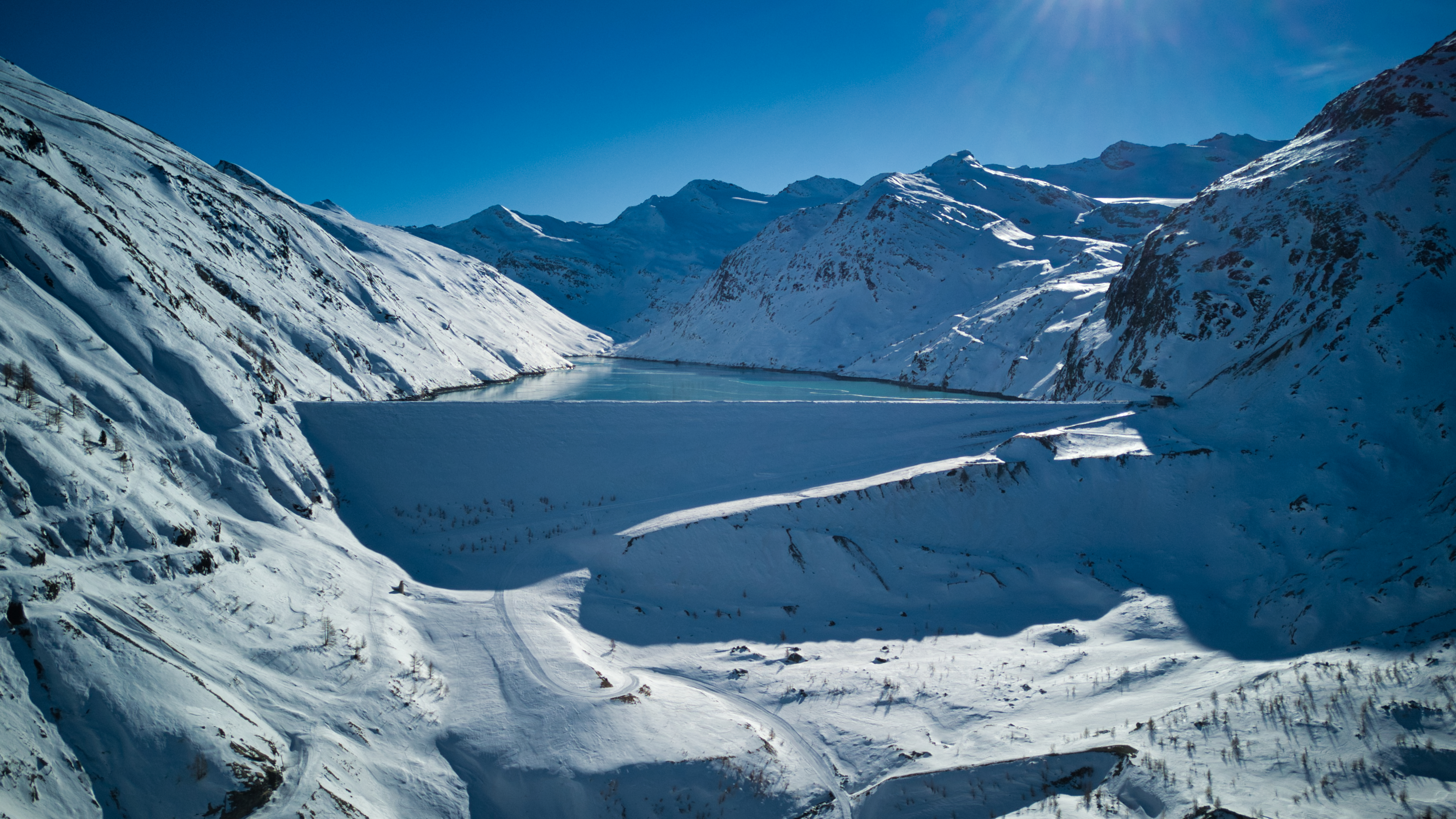 Mattmarksee im Januar 2020 Richtung Süden